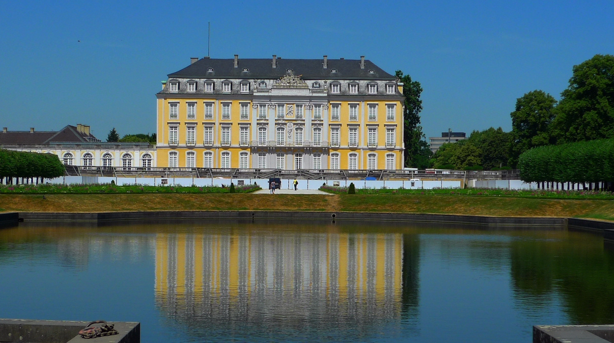 Schloss Augustusburg – Blick vom Schlosspark (Südseite)